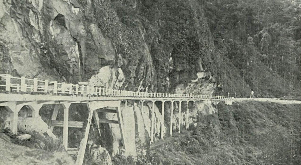 Trecho da Estrada Rio-Petrópolis onde aconteceu o acidente com o veículo do Presidente Vargas, na noite de 25 de abril de 1933.